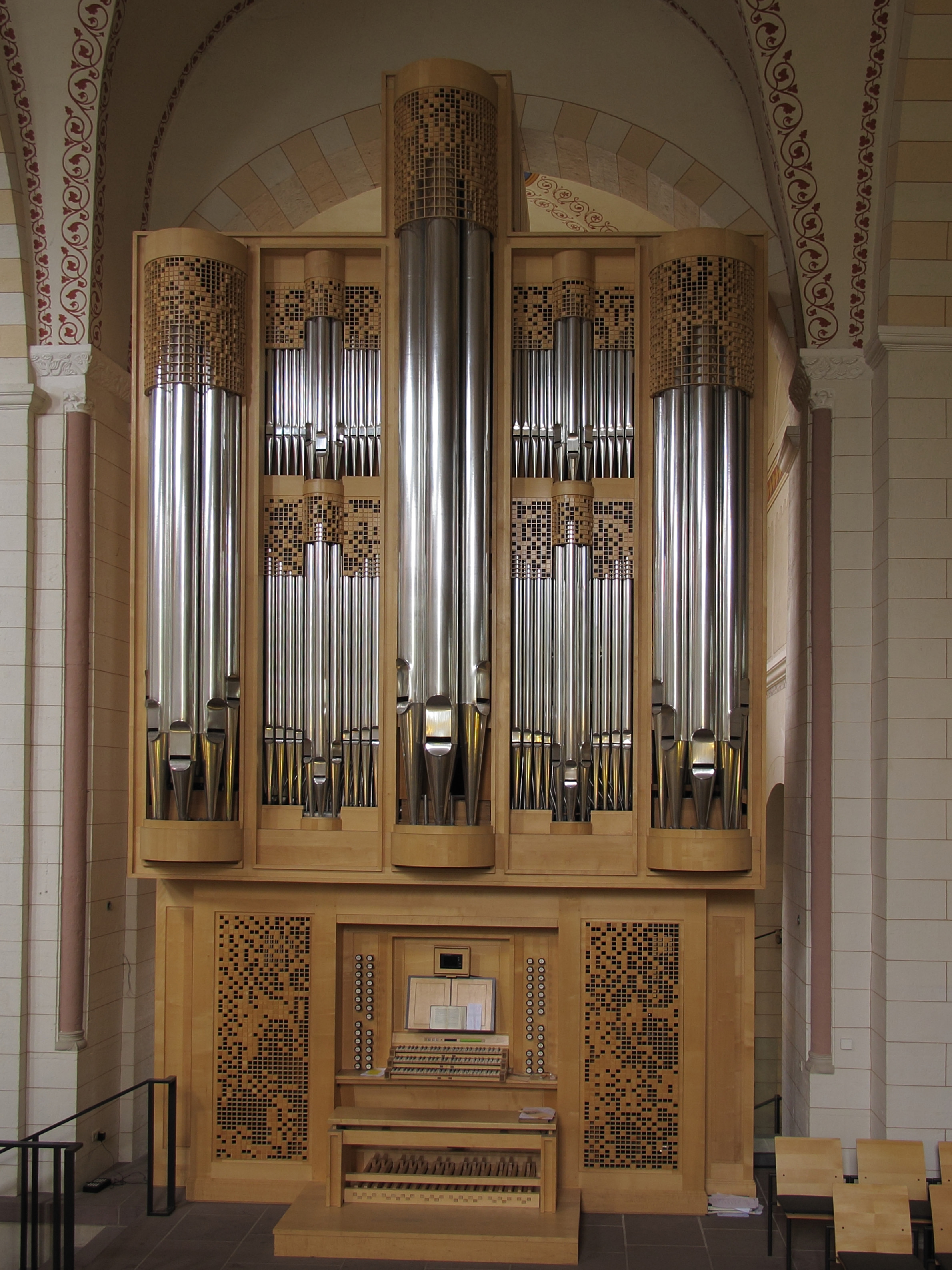 Bad Gandersheim: Stiftskirche, Orgel